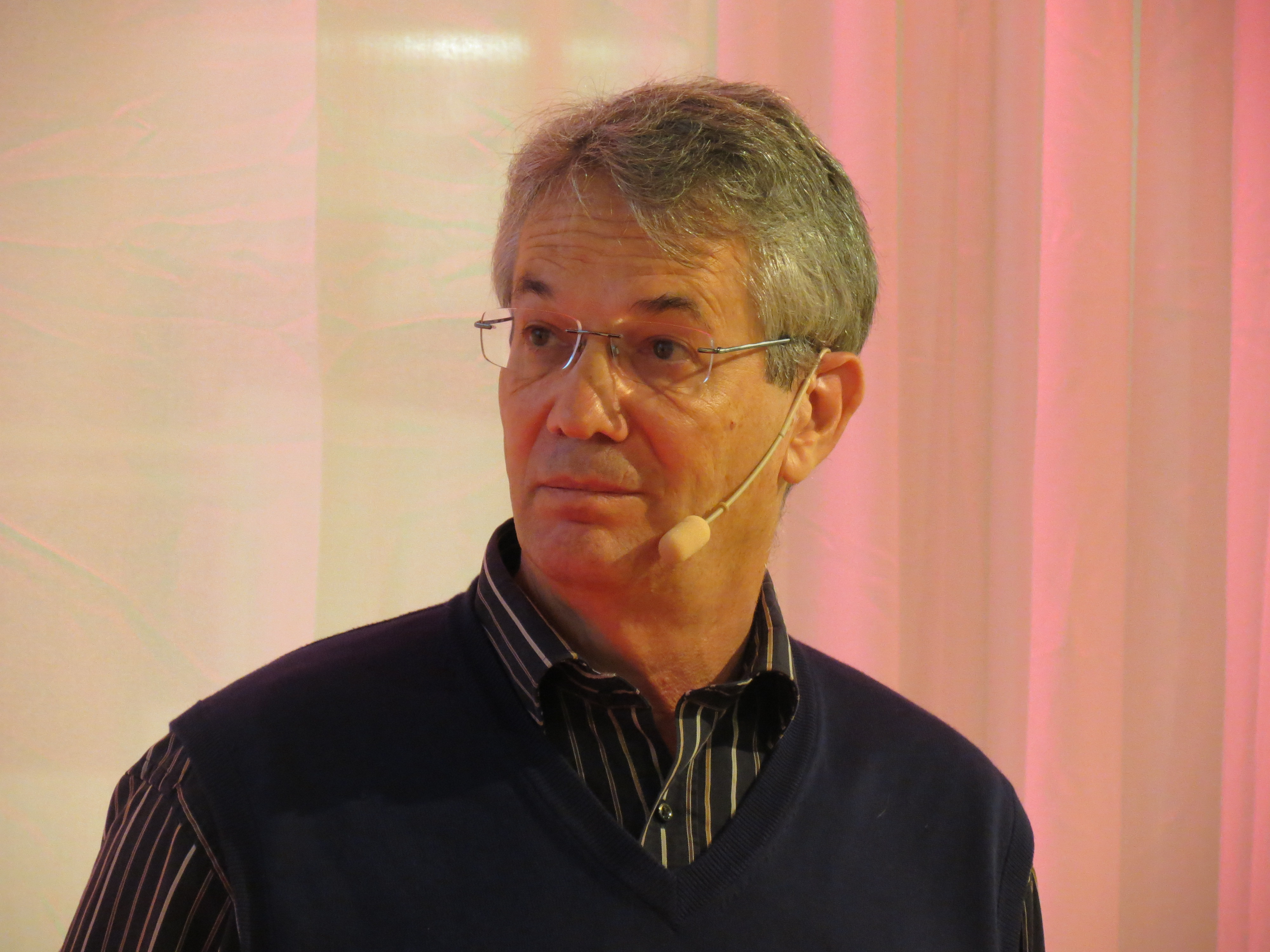 Mikael Heimann, professor i utvecklingspsykologi vid Linköpings universitet, föreläser på Forskartorget på Bokmässan 2014.